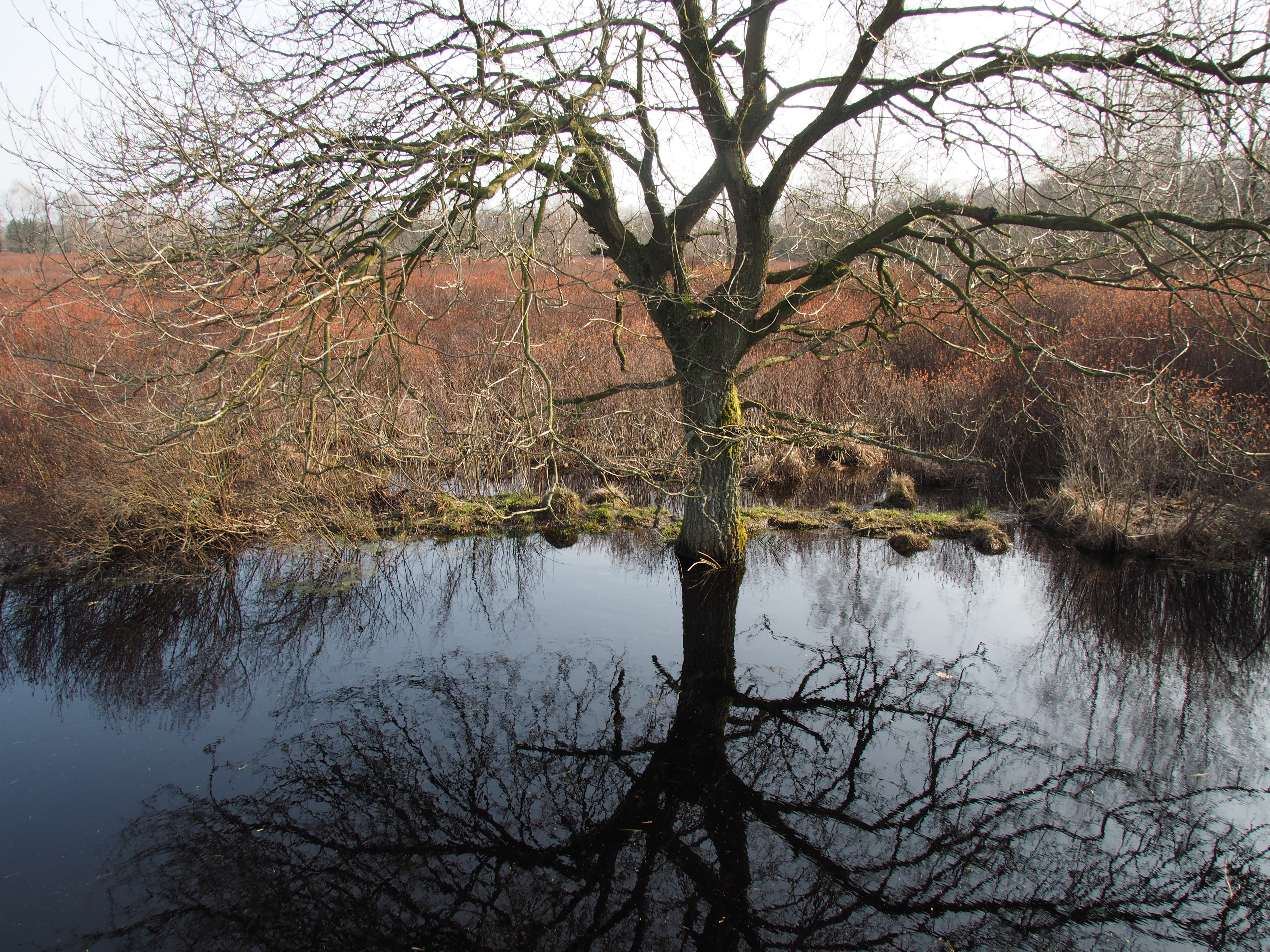 Fläche mit Gagelstrauch (Myrica gale) im Ostenholzer Moor